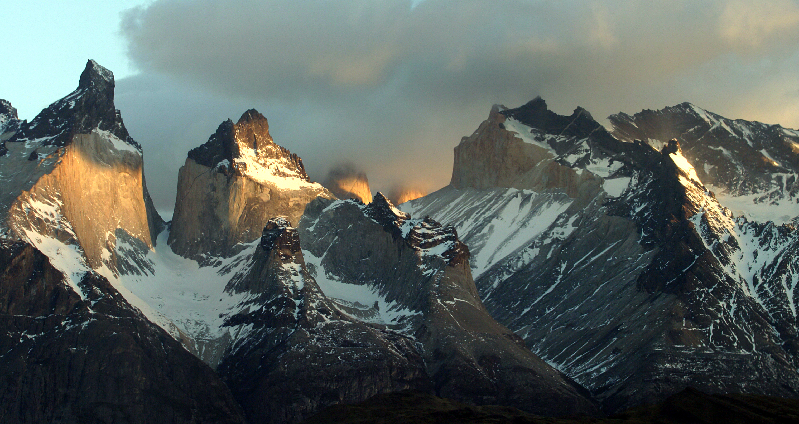 Los Cuernos del Paine, Parque Nacional Torres del Paine, Patagonia, Chile